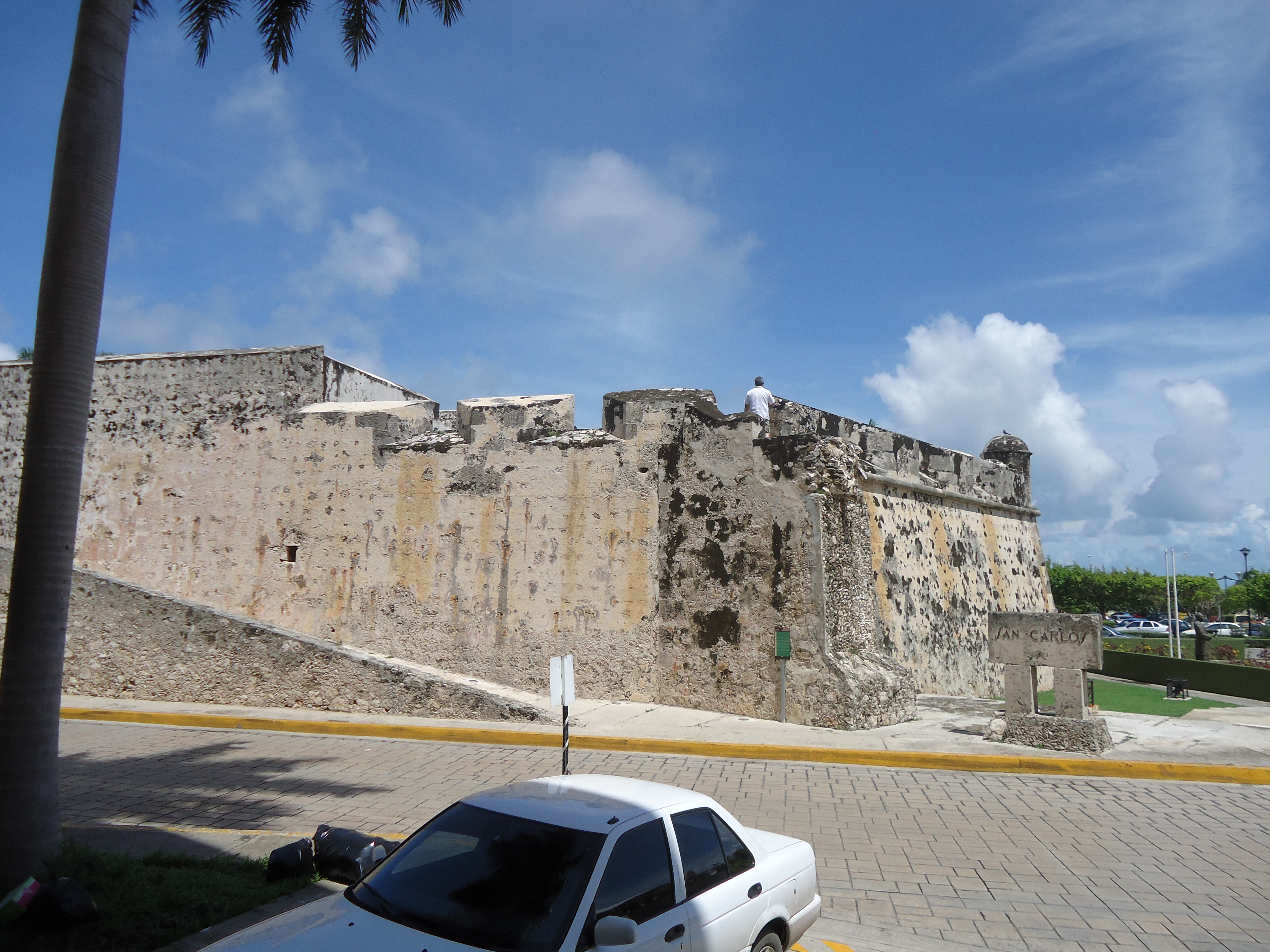 Fotografía del Baluarte de San Carlos, San Francisco de Campeche, Campeche